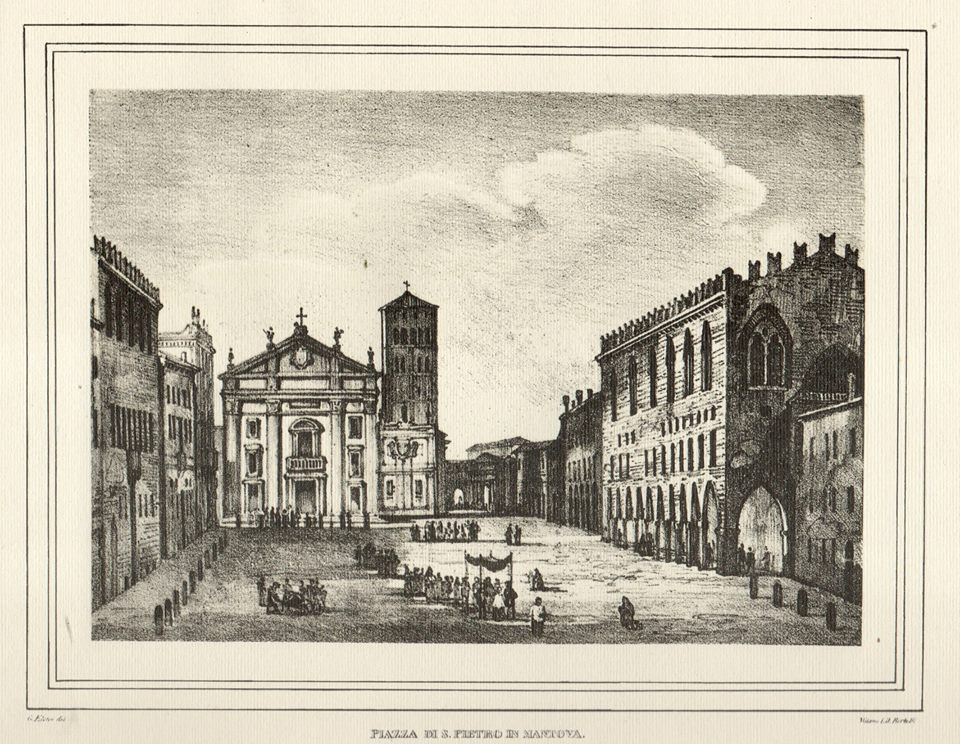 miniatura di Piazza Sordello nel 700